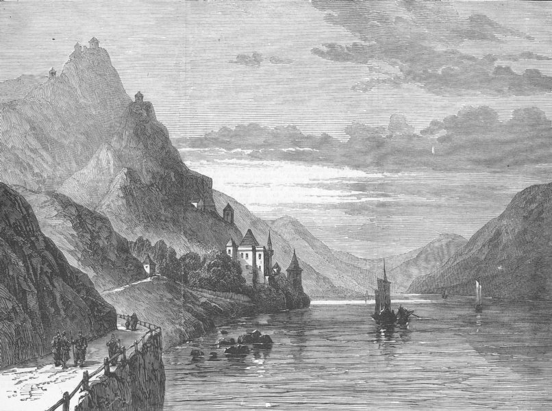 Вид на Зворник (Босния и Герцеговина) в 1876 году